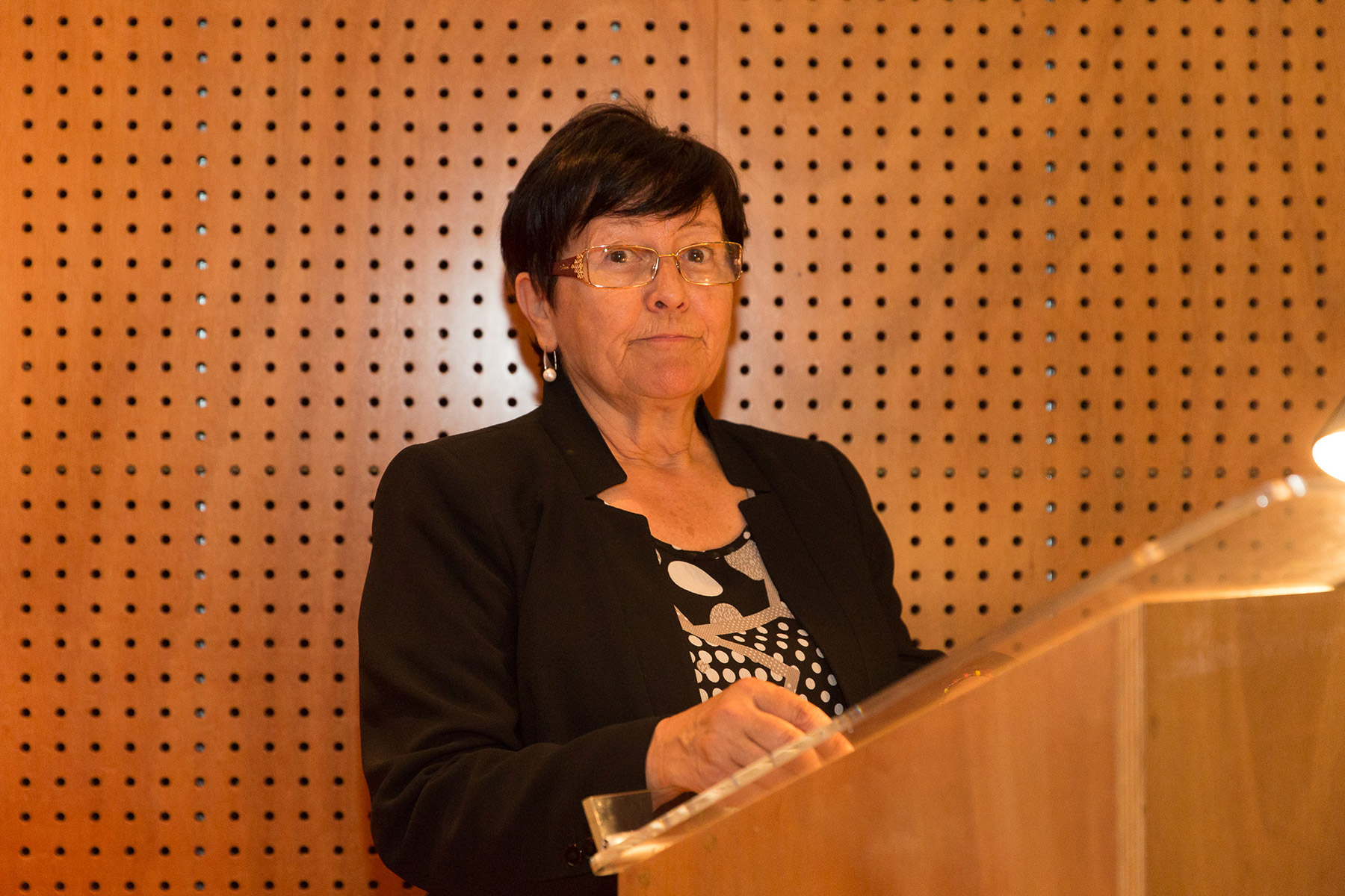 Aída Fernández Ríos (Q21997886)